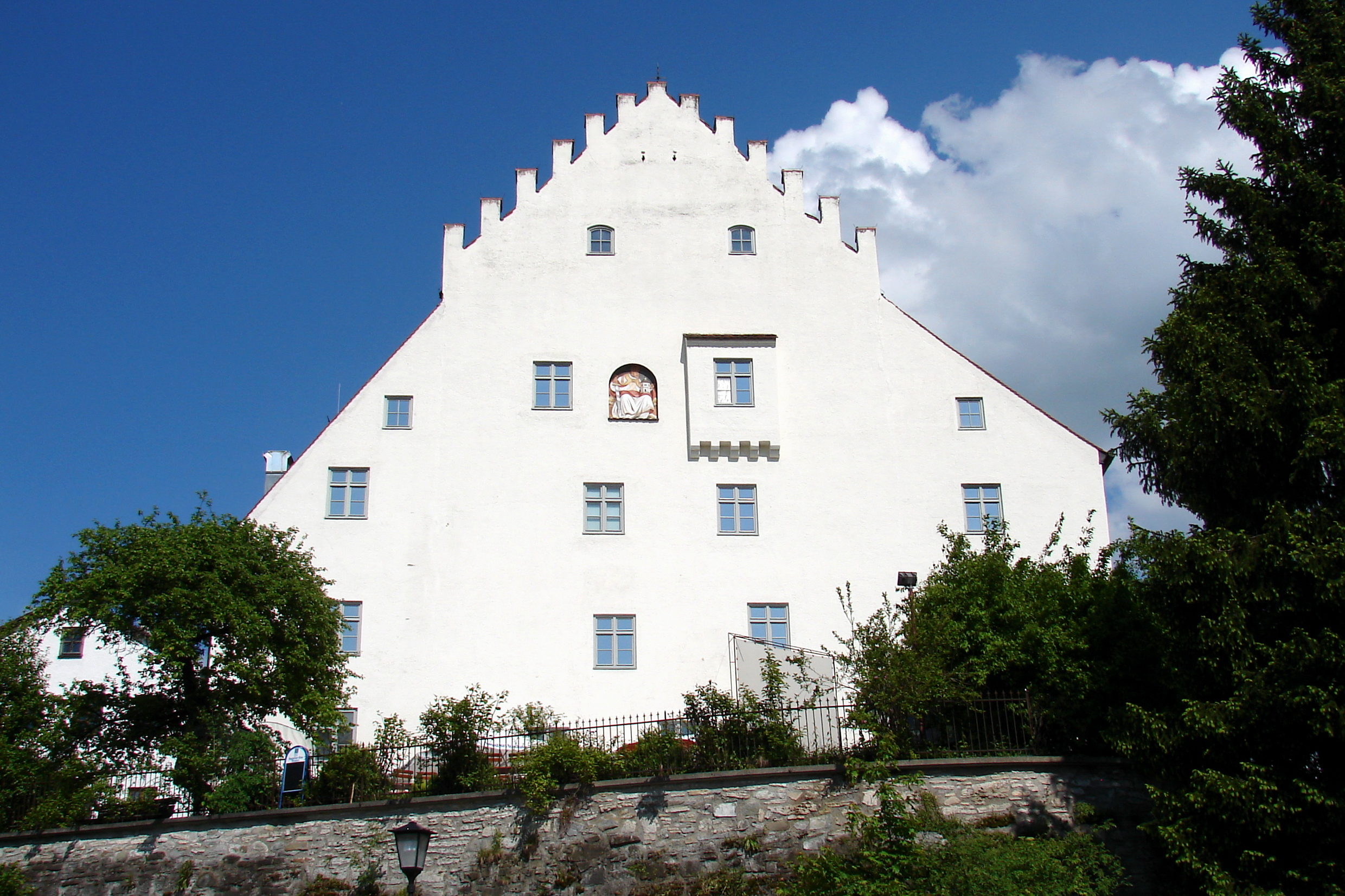 Anlage 15./16. Jh.; Hauptbau, zwei- bzw. dreigeschossiger stattlicher Frackdachbau mit Zinnengiebel, 2. Hälfte 15. Jh.